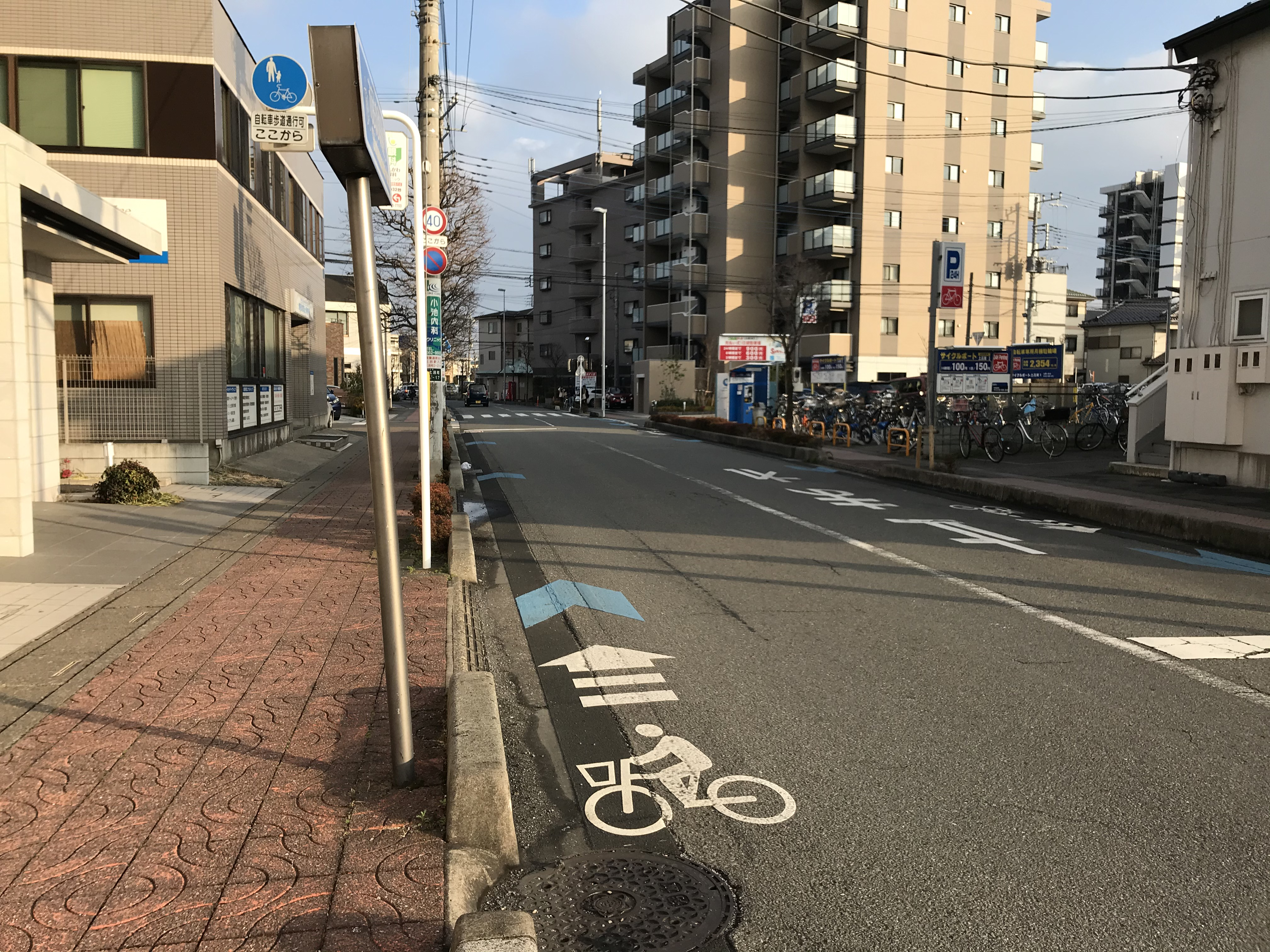 土呂駅東口から伸びる市民の森通りを撮影しました。